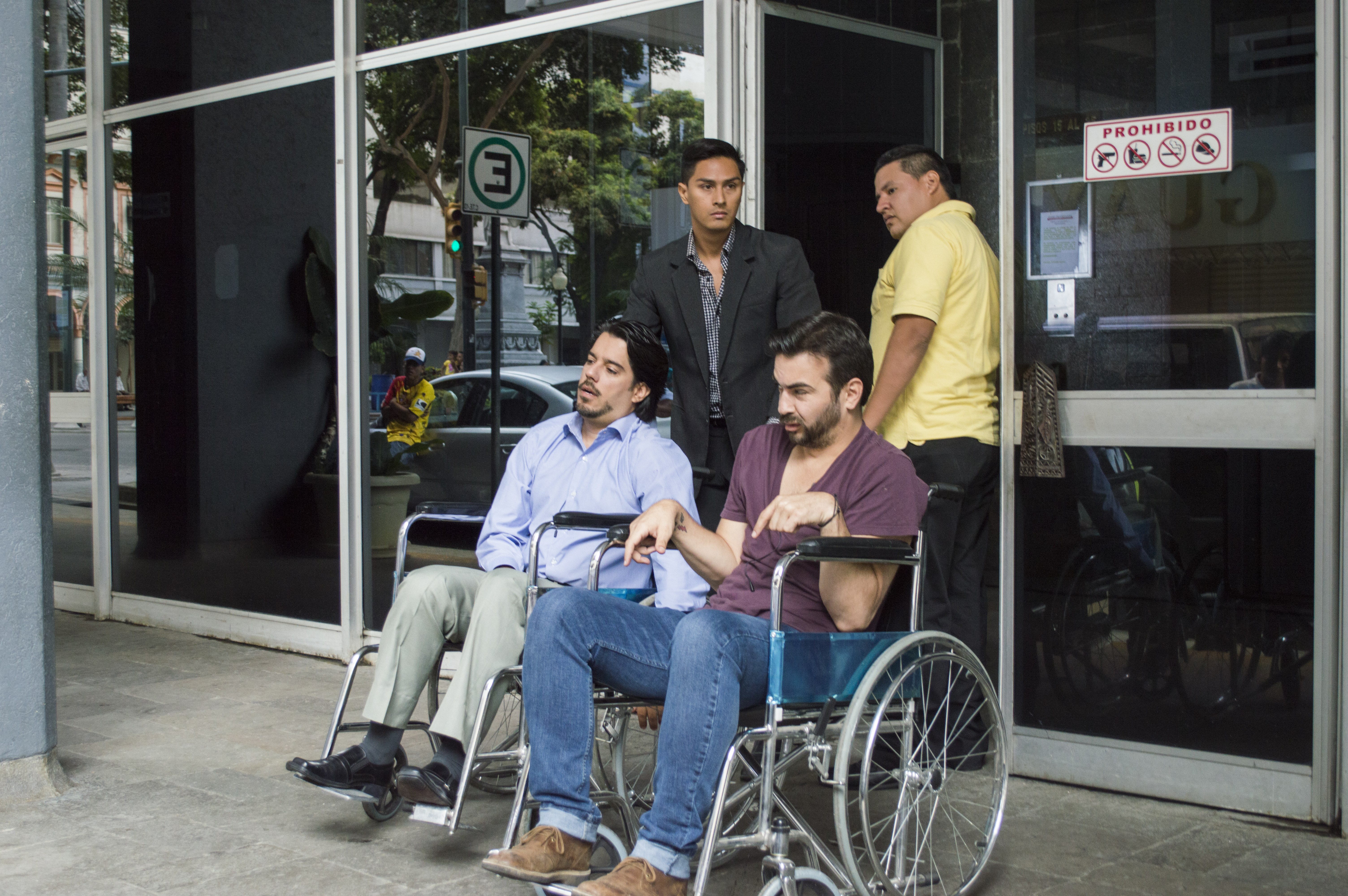 Fernando Rendón y Juan Carlos Martínez en silla de ruedas, ambos personajes de Solteros Sin Compromiso durante la grabación de la serie en 2014, interpretados por Andrés Pellacini y Diego Spotorno respectivamente.